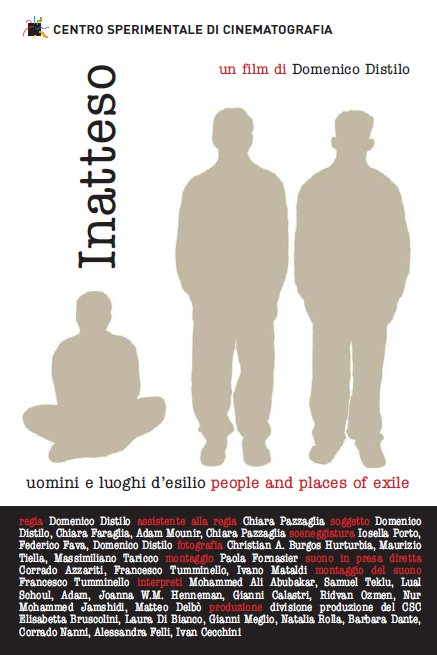 Locandina del film Inatteso